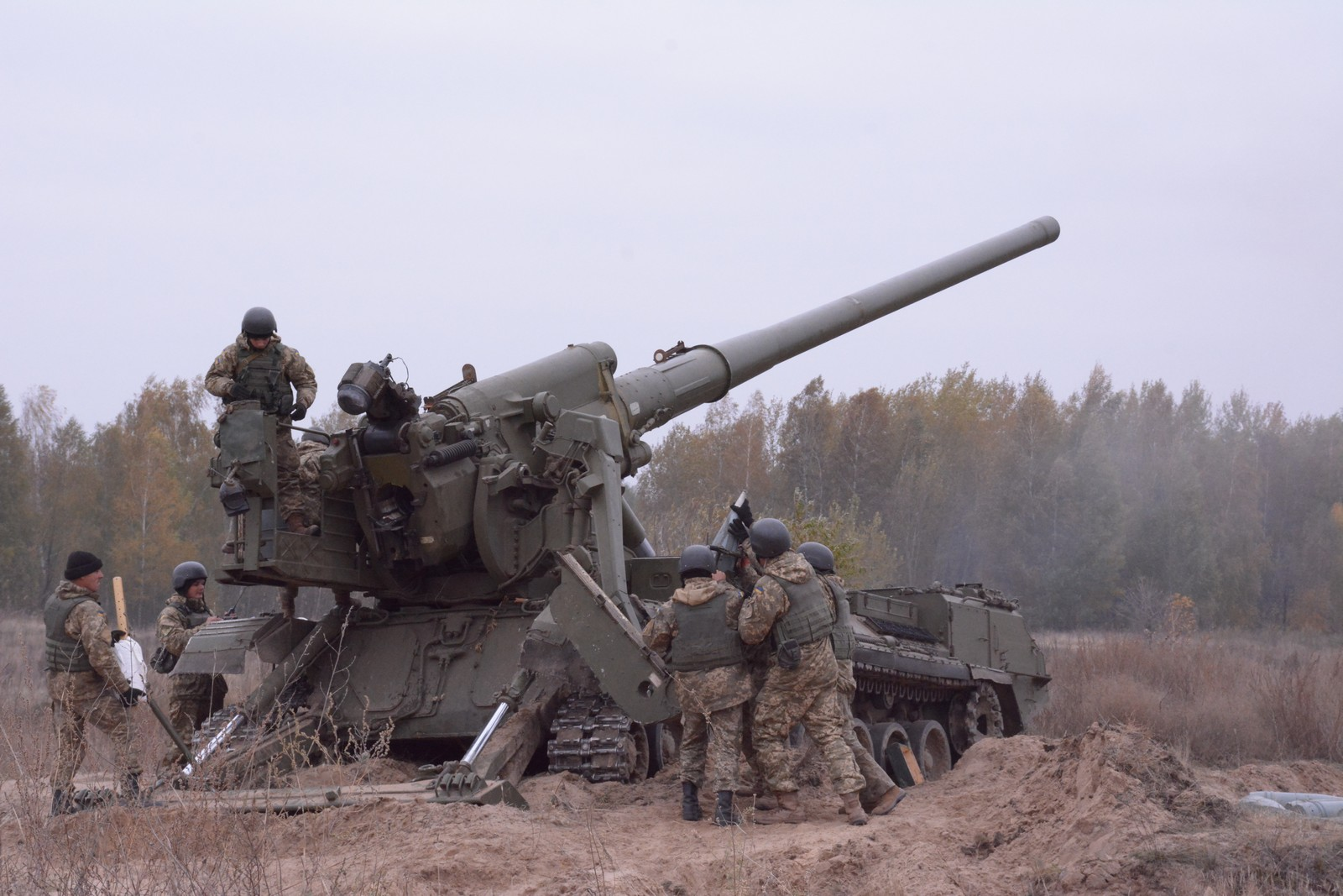 На полігоні “Дівички”, що на Київщині, відбувся практичний етап стратегічних командно-штабних навчань “Рубіж – 2016”. Навчально-бойові завдання виконували артилерійські підрозділи. Гарматні та самохідні дивізіони та батареї відпрацювали вогневі вправи зі знищення різних цілей. Проведення бойових стрільб дозволило підвищити рівень управління частинами і підрозділами, злагодженість артилерійських підрозділів та індивідуальну професійну майстерність військовослужбовців.